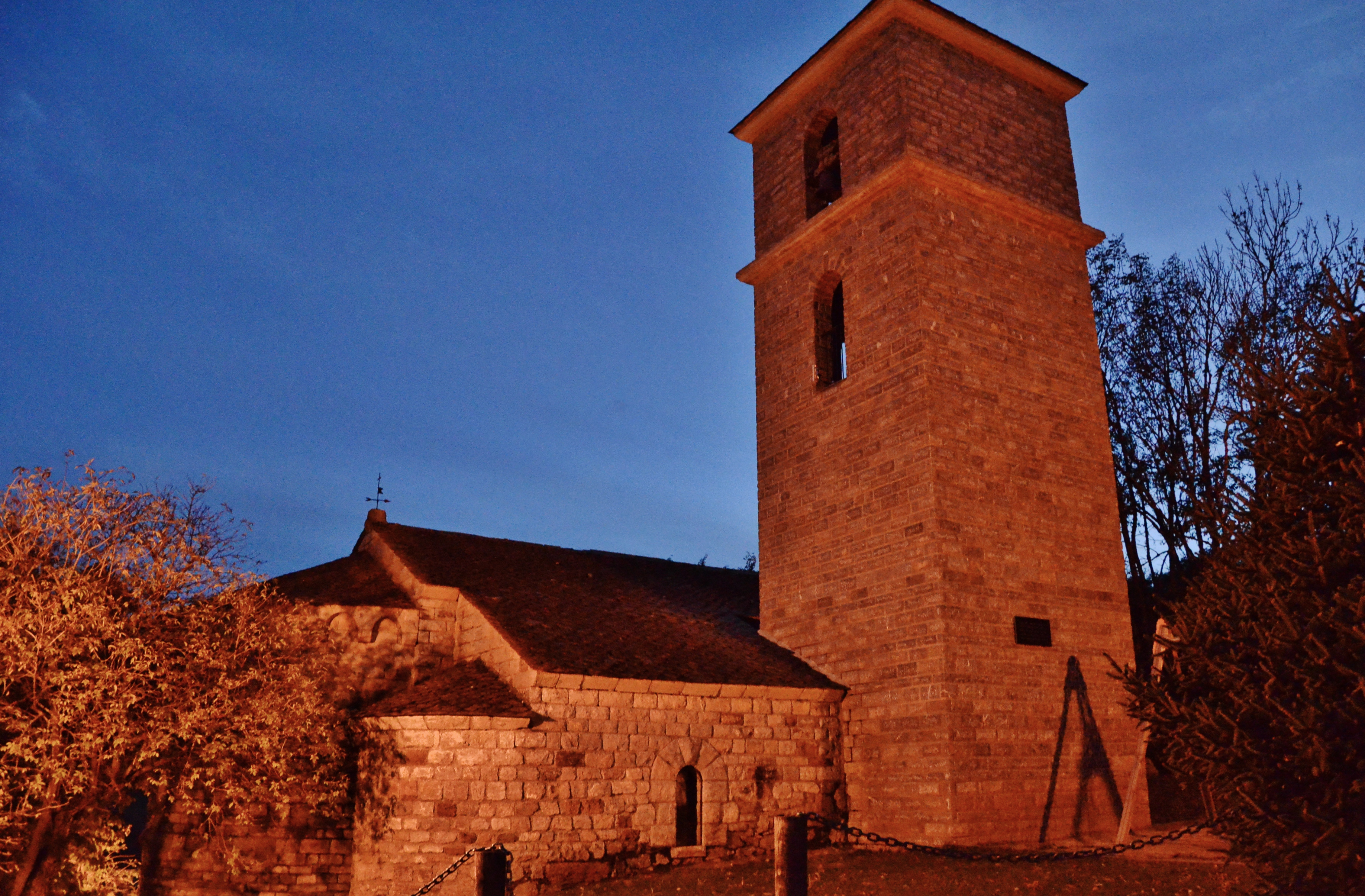 Església parròquial de Sant Miquel d'Isòvol